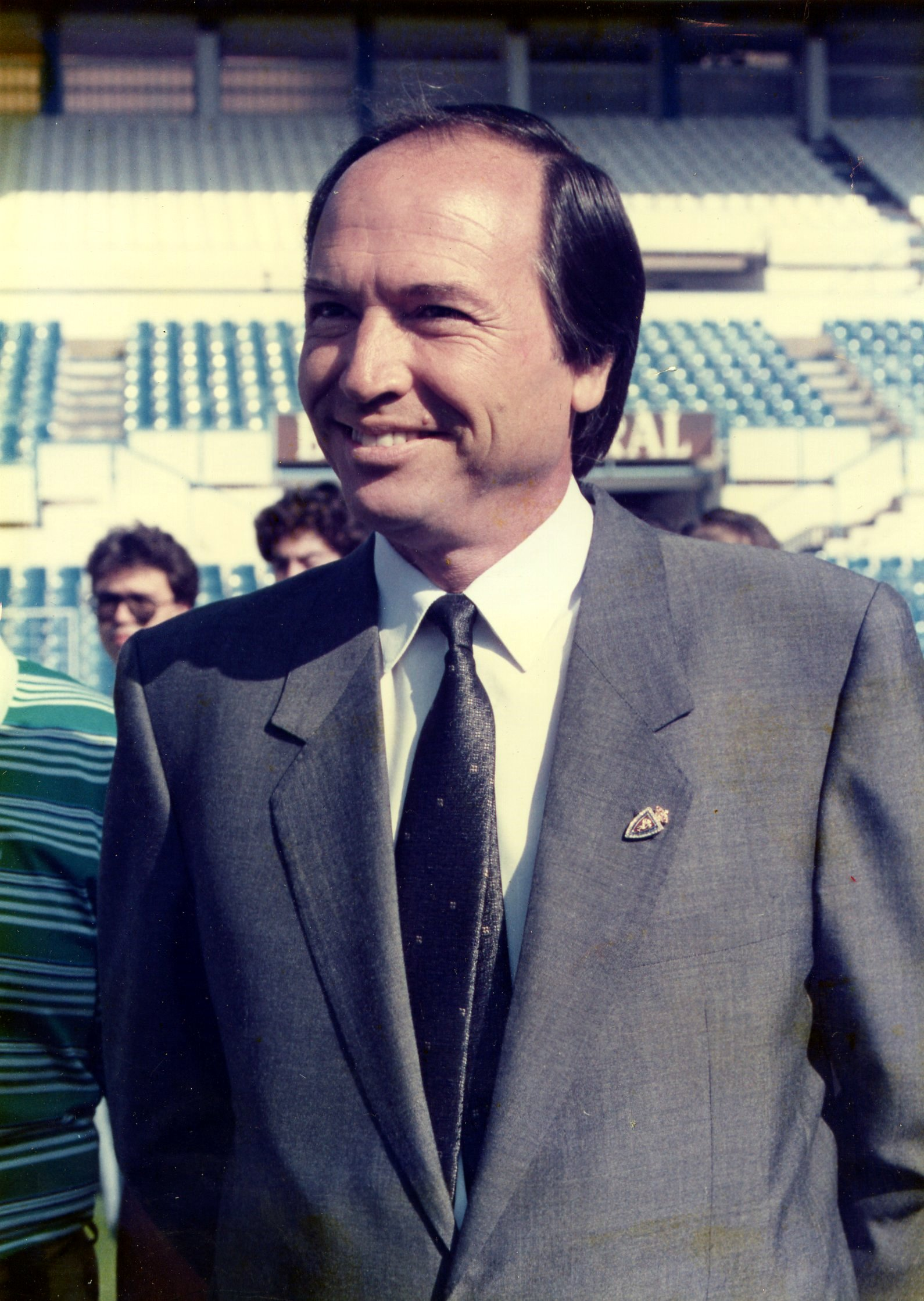 Foto de José Ángel Zalba en el estadio de la Romareda,siendo Presidente del Real Zaragoza.(1992)